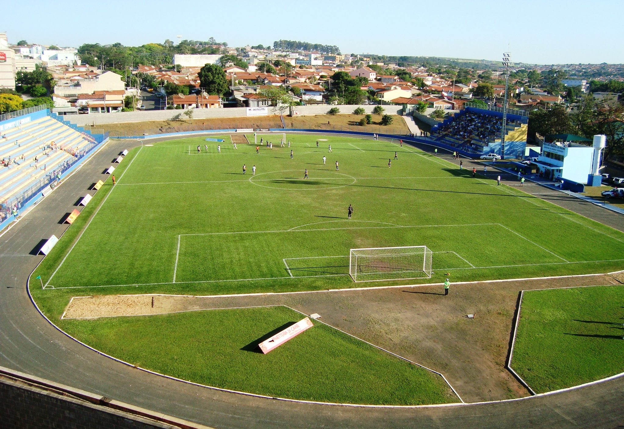 Vista do Estádio Municipal Luís Perissinoto, em Paulínia.